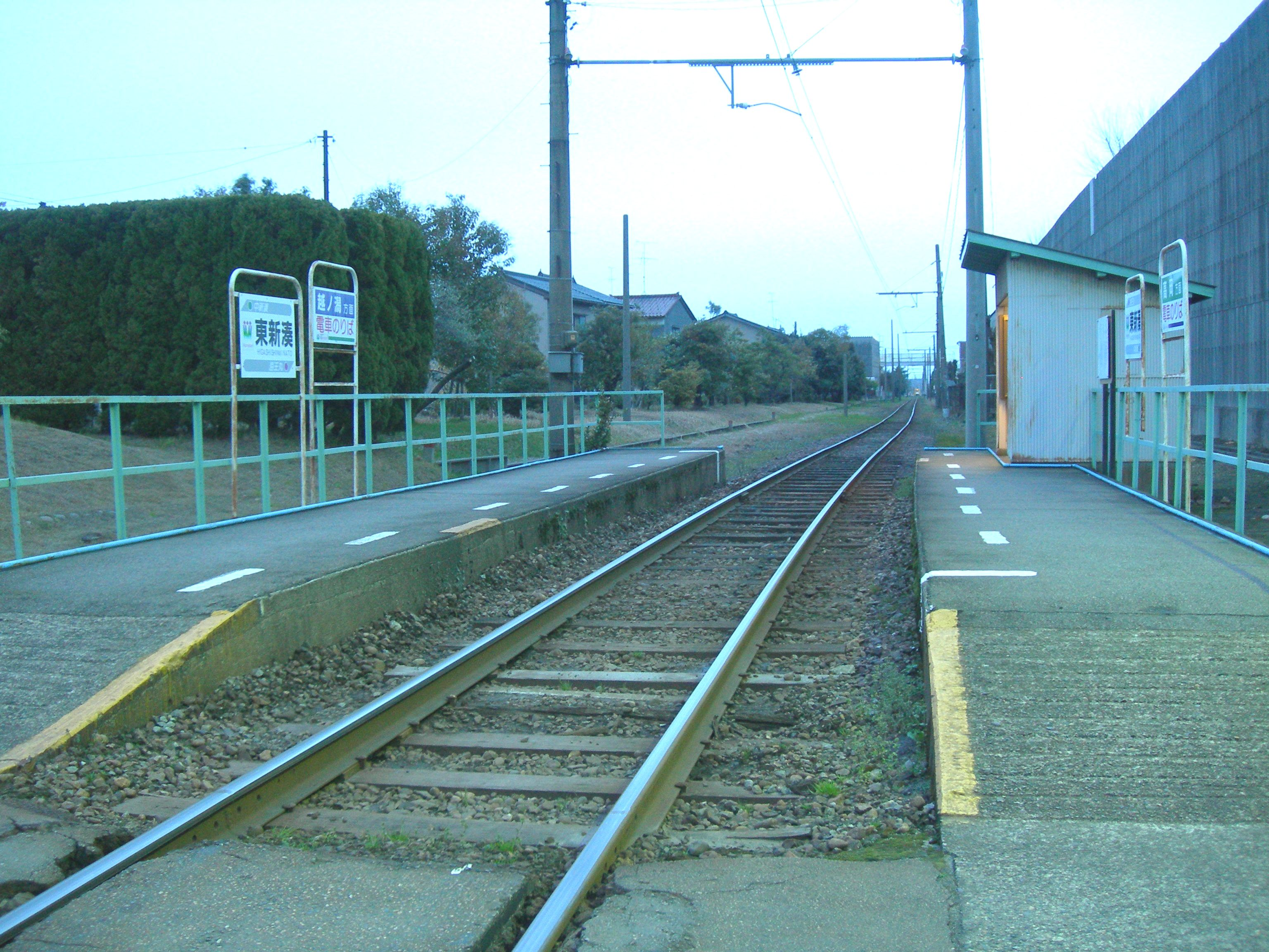 東新湊駅